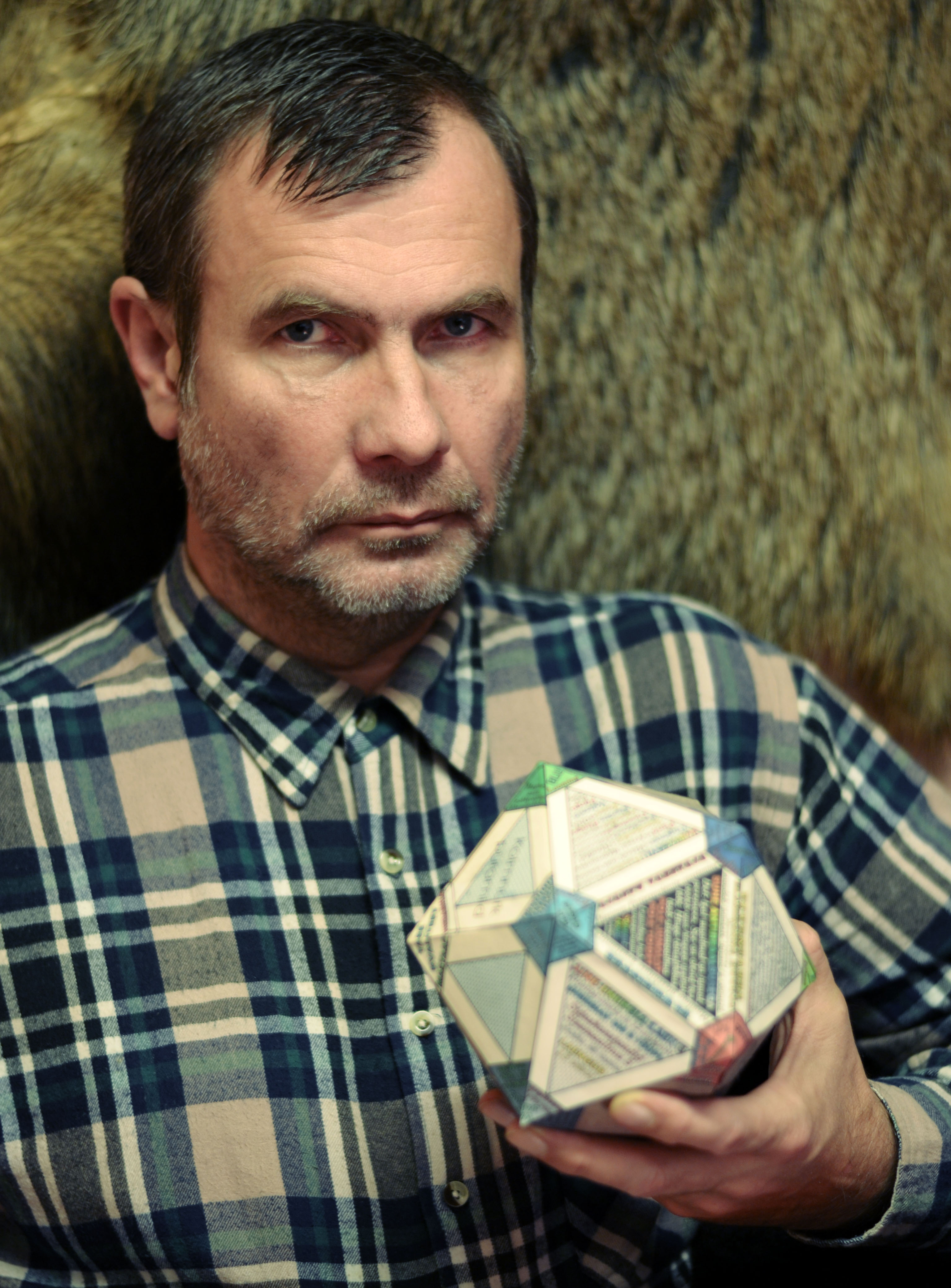 Hannes Vanaküla hoidmas juhtruumi kristalli käes